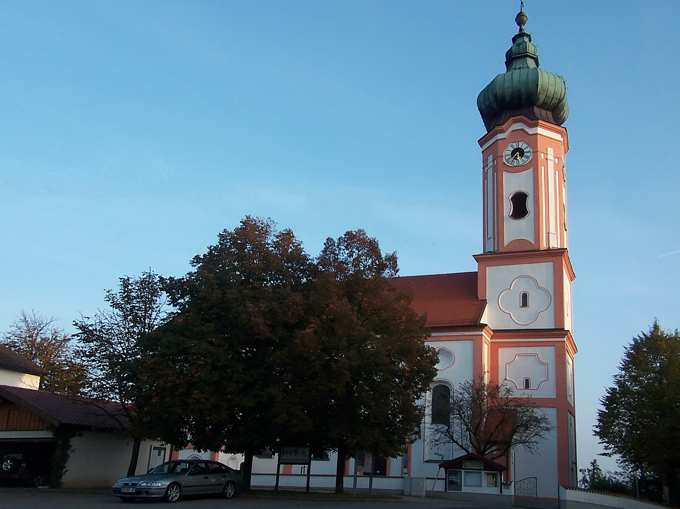 Thürnthenning, Herrengasse 2. Kath. Filialkirche St. Johannes Nepomuk, barocker Saalbau mit kaum eingezogenem Chor und Westturm, von Georg Weigenthaller, 1732; mit Ausstattung; inweithin sichtbarer Höhenlage.